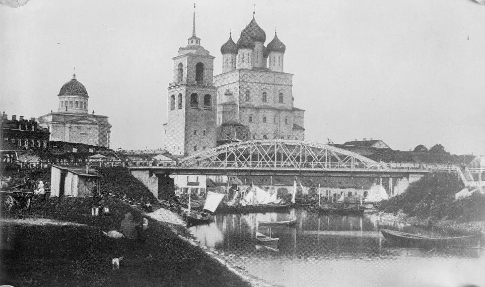 Pskov en fecha desconocida.